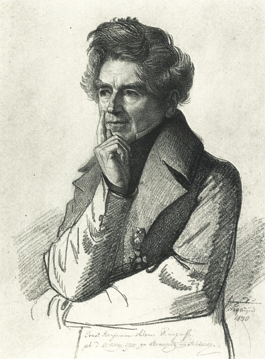 Porträt des Dichters Ernst Benjamin Salomo Raupach